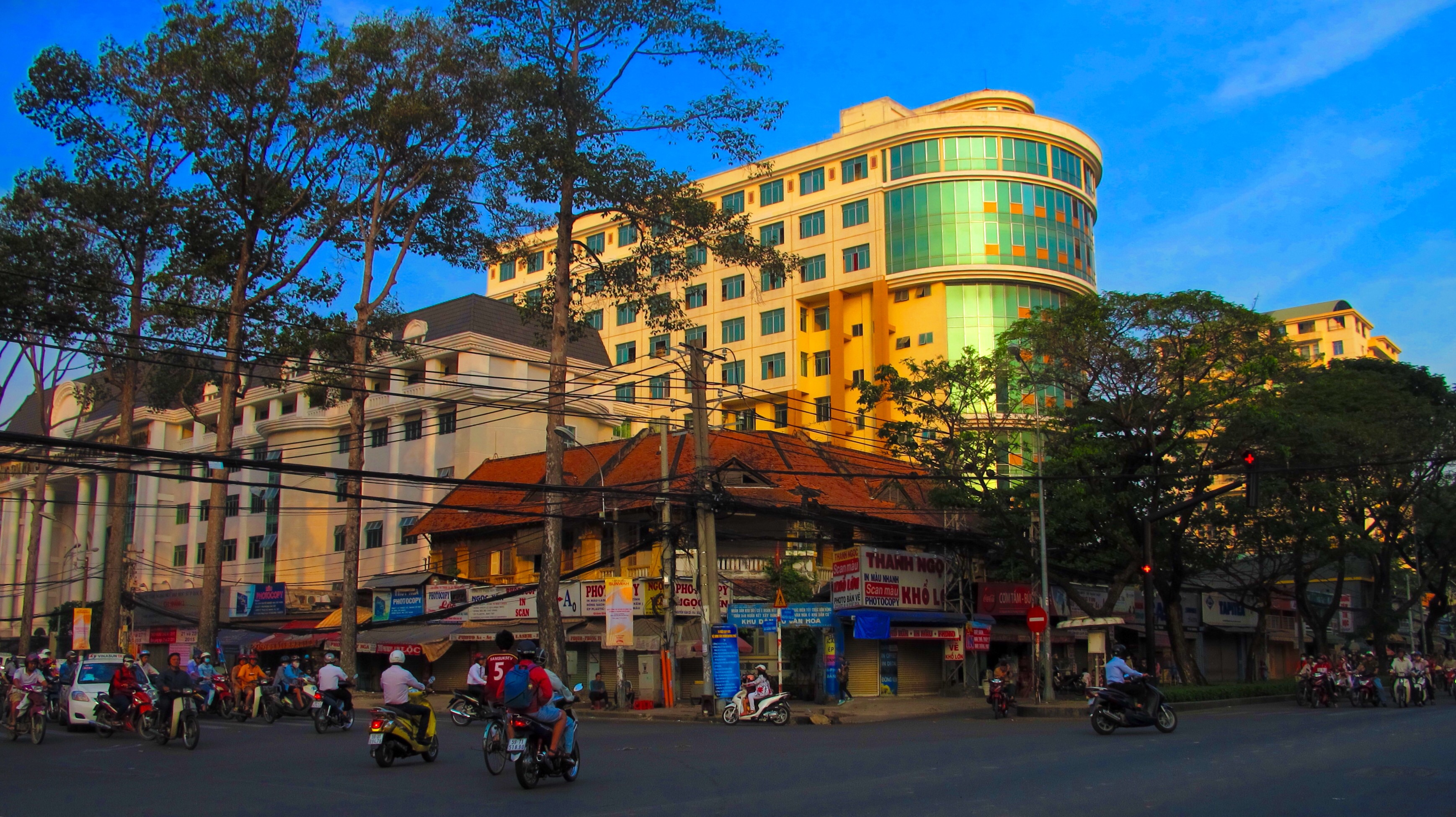 Truong Dai hoc Su pham, an vuong duong ,quan 5, hcmcity